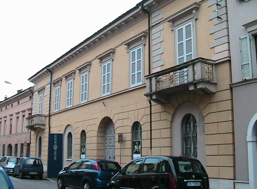 CASALMAGGIORE - Palazzo e Museo Diotti